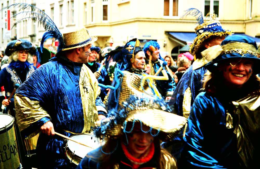 Los Brillantos vom Schillergymnasium während des Veedelszuges in Köln-Sülz